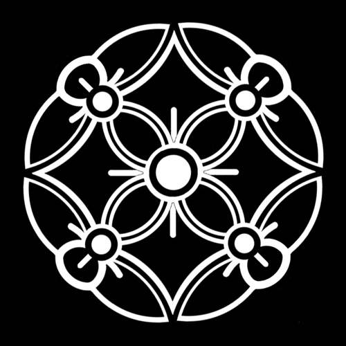 松本金太郎定紋（染抜）